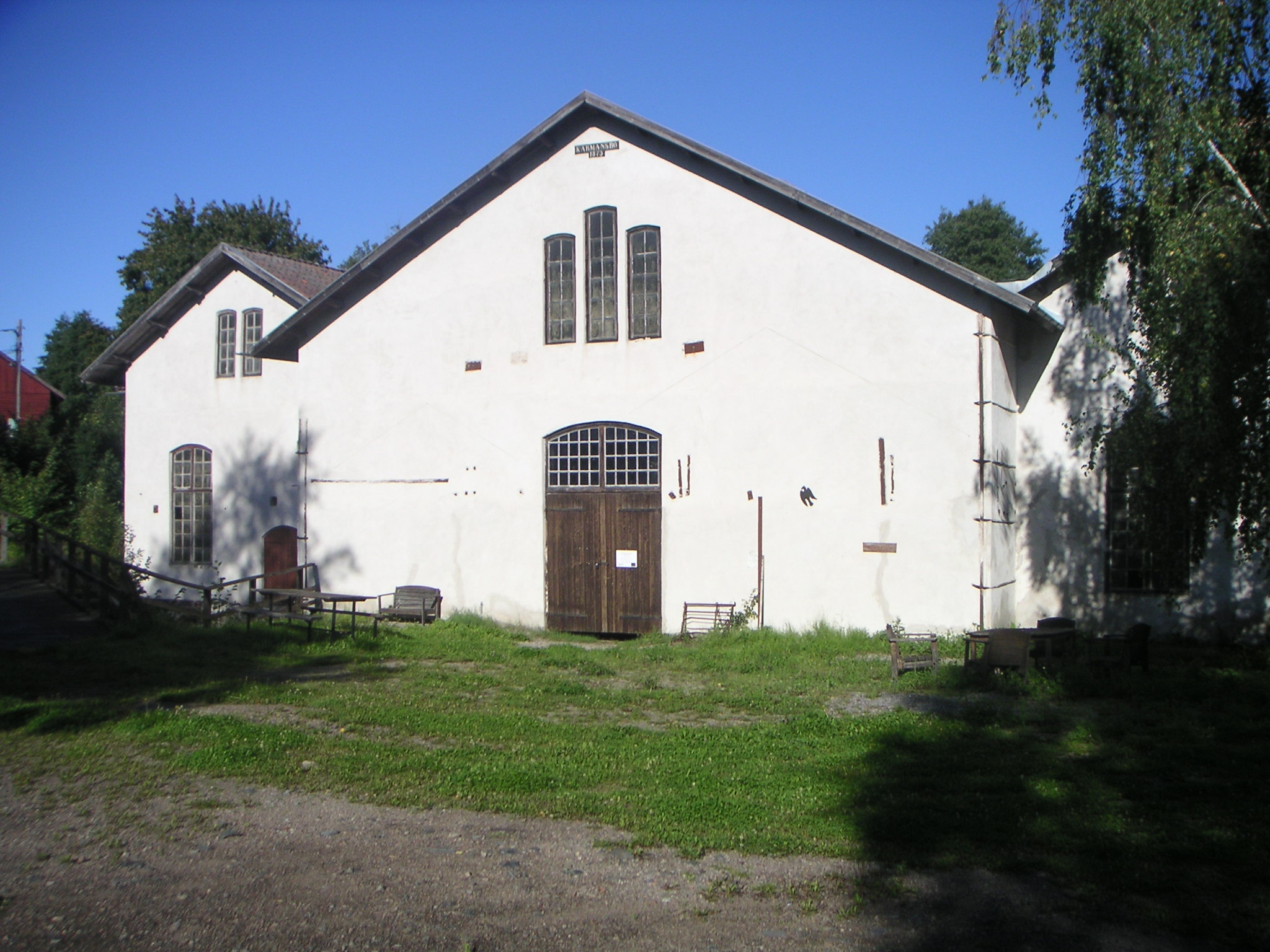 Karmansbo bruk - lancashiresmedjan